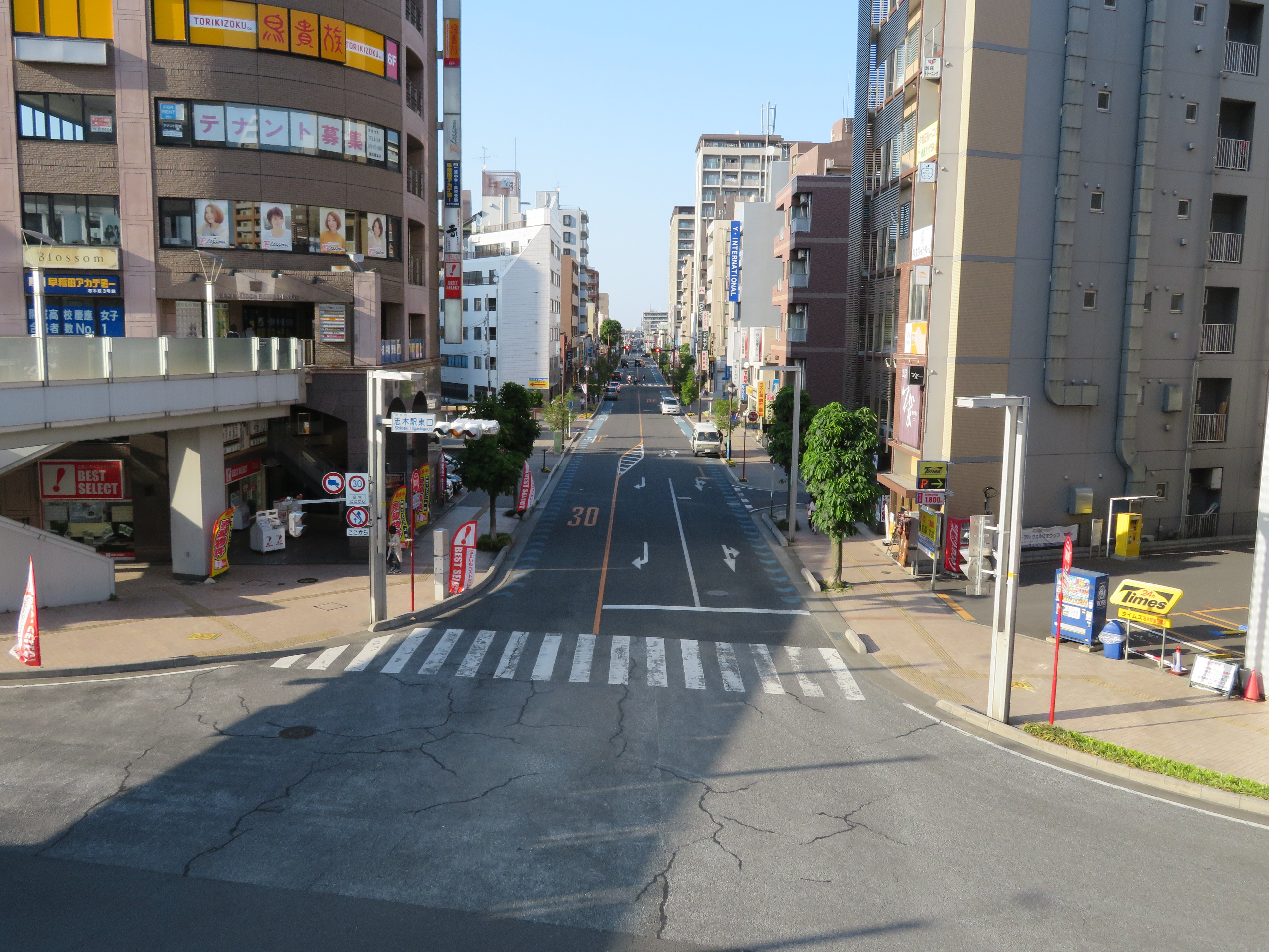 埼玉県道244号線志木市志木駅東口交差点付近（志木市役所方面を撮影） Canon PowerShot SX720 HS